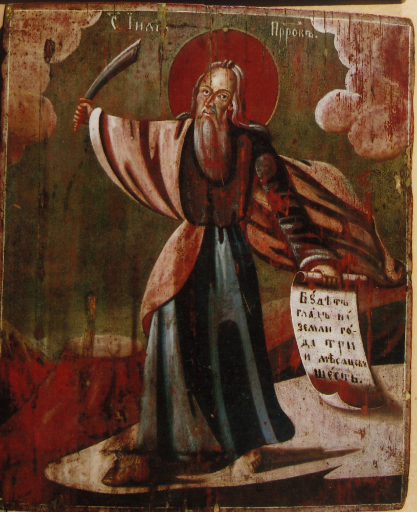 Илья Пророк грозящий. XIX в. Россия. Дерево, темпера. 30х25,5 Омский музей имени М. А. Врубеля.